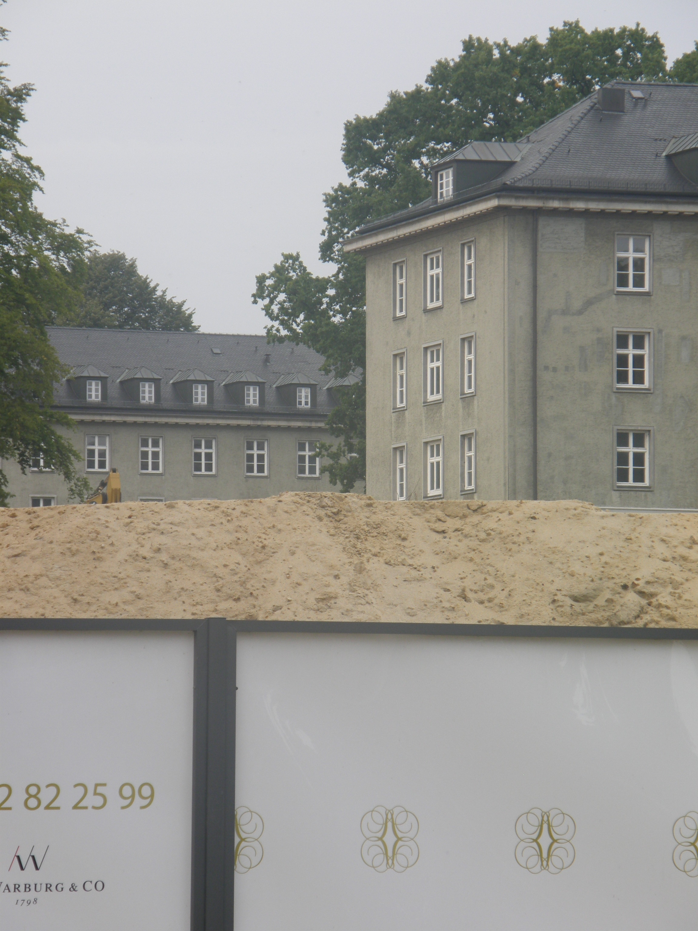 harvestehuder weg hamburg